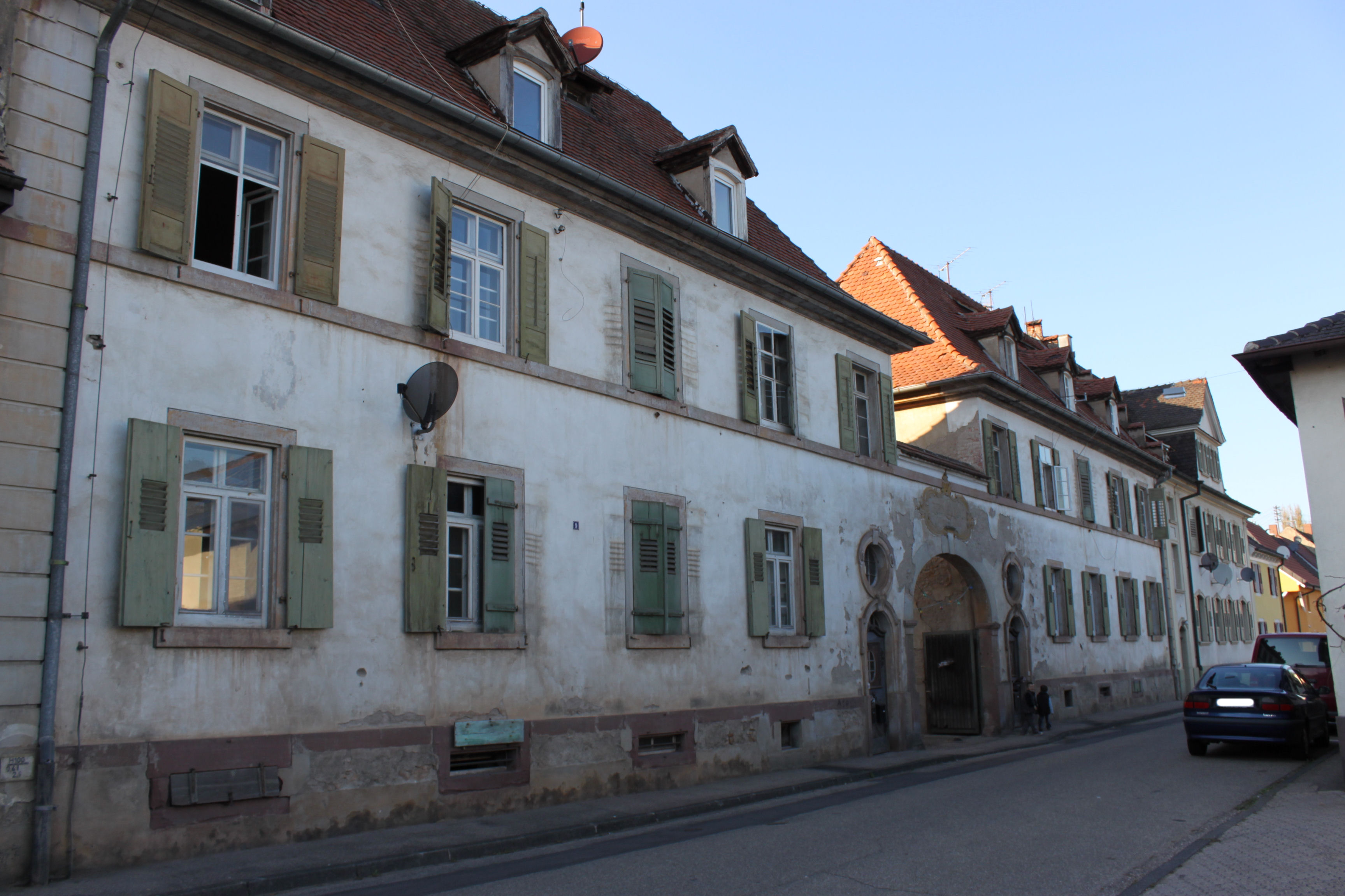 Luxhof in Riegel am Kaiserstuhl; erbaut durch die Brauereiherren Meyer&söhne; Wohnungen für Mitarbeiter und Stallungen für die herrschaftlichen Pferde